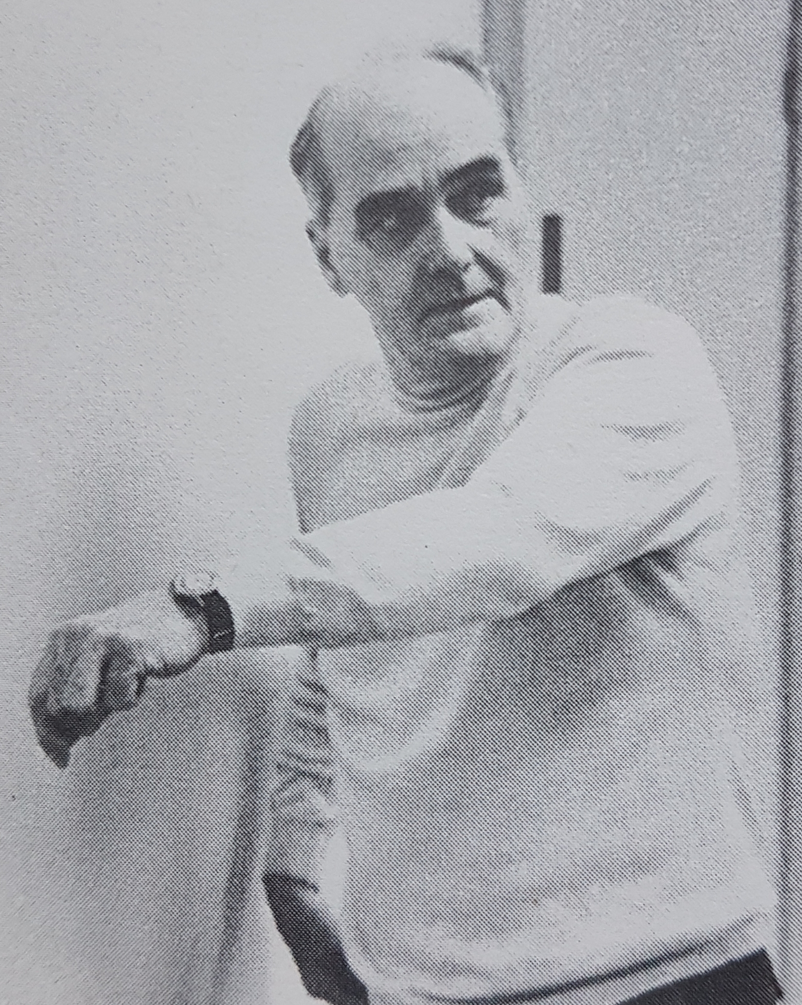 Oskar Person Artist from Sweden